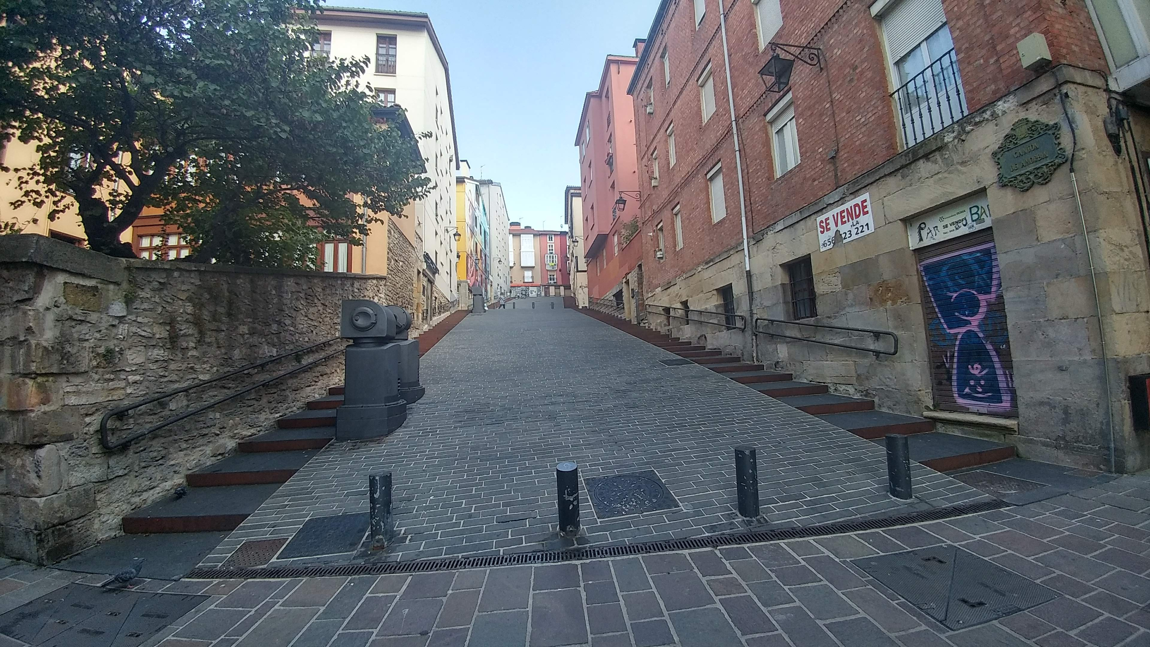 Gasteizko Anorbin kantoia